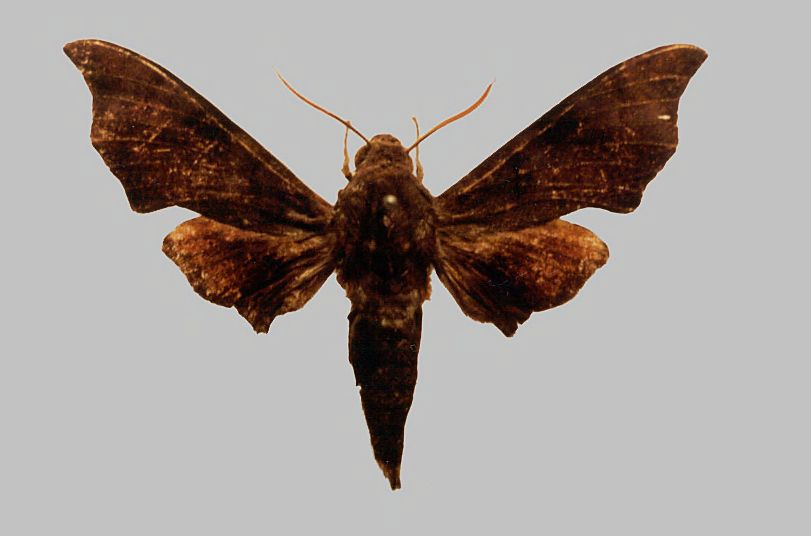 Dahira pinratanai pinratanai, male upperside